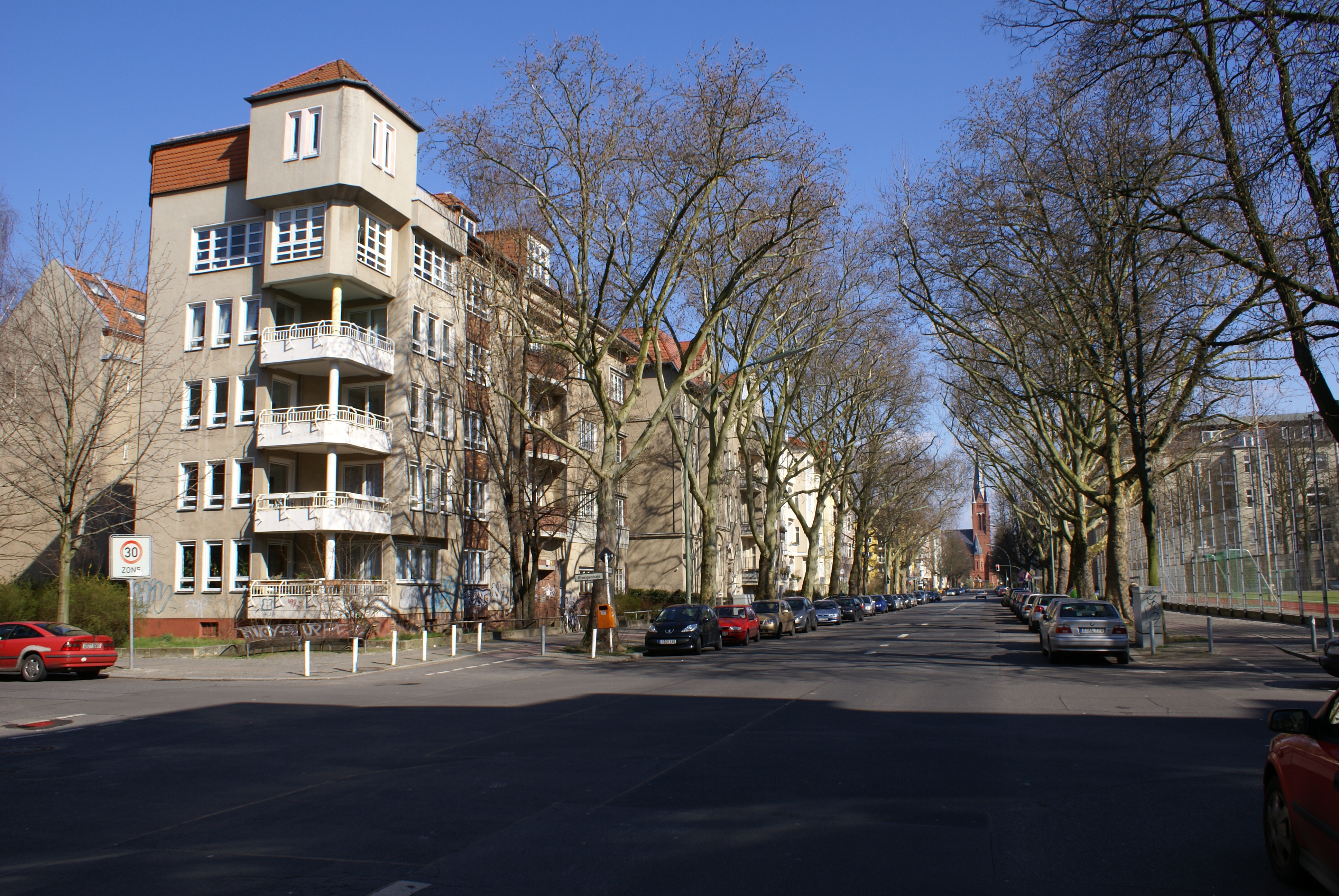 Wiesbadener_Ecke_Rheingaustr.JPG